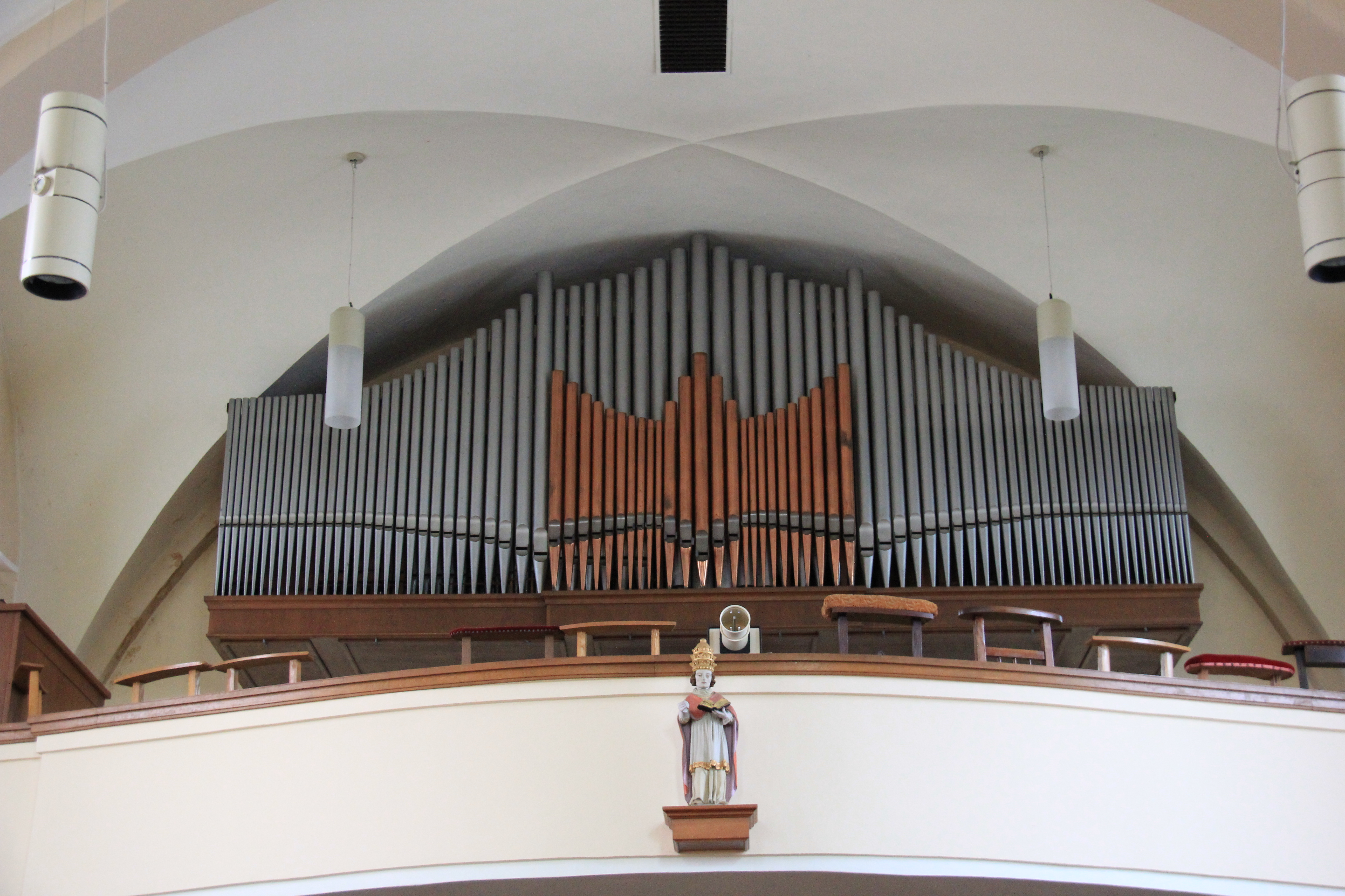 D'Uergel an der Ielwener Parkierch (Gem. Biekerech). Se gouf 1958 vum Nic. Loewen vu Lëntgen gebaut.